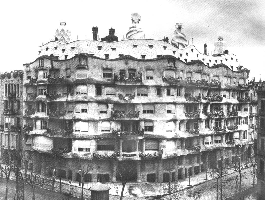 La Casa Milà hacia 1912-1914, foto anónima publicada en Revista Nova, Barcelona (23-05-1914).